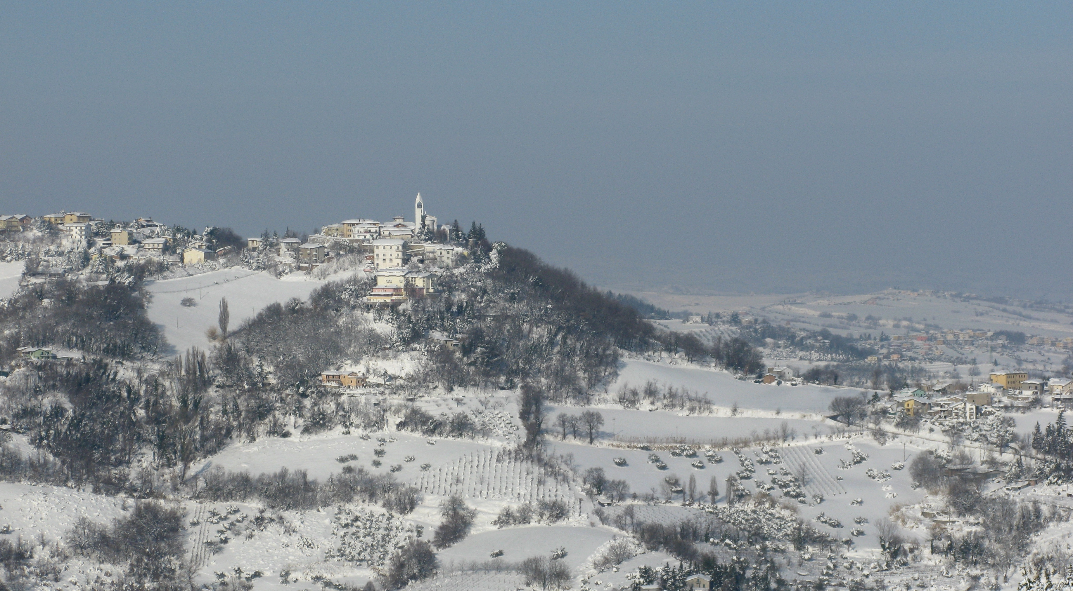 Gemmano, nevicata 2012.